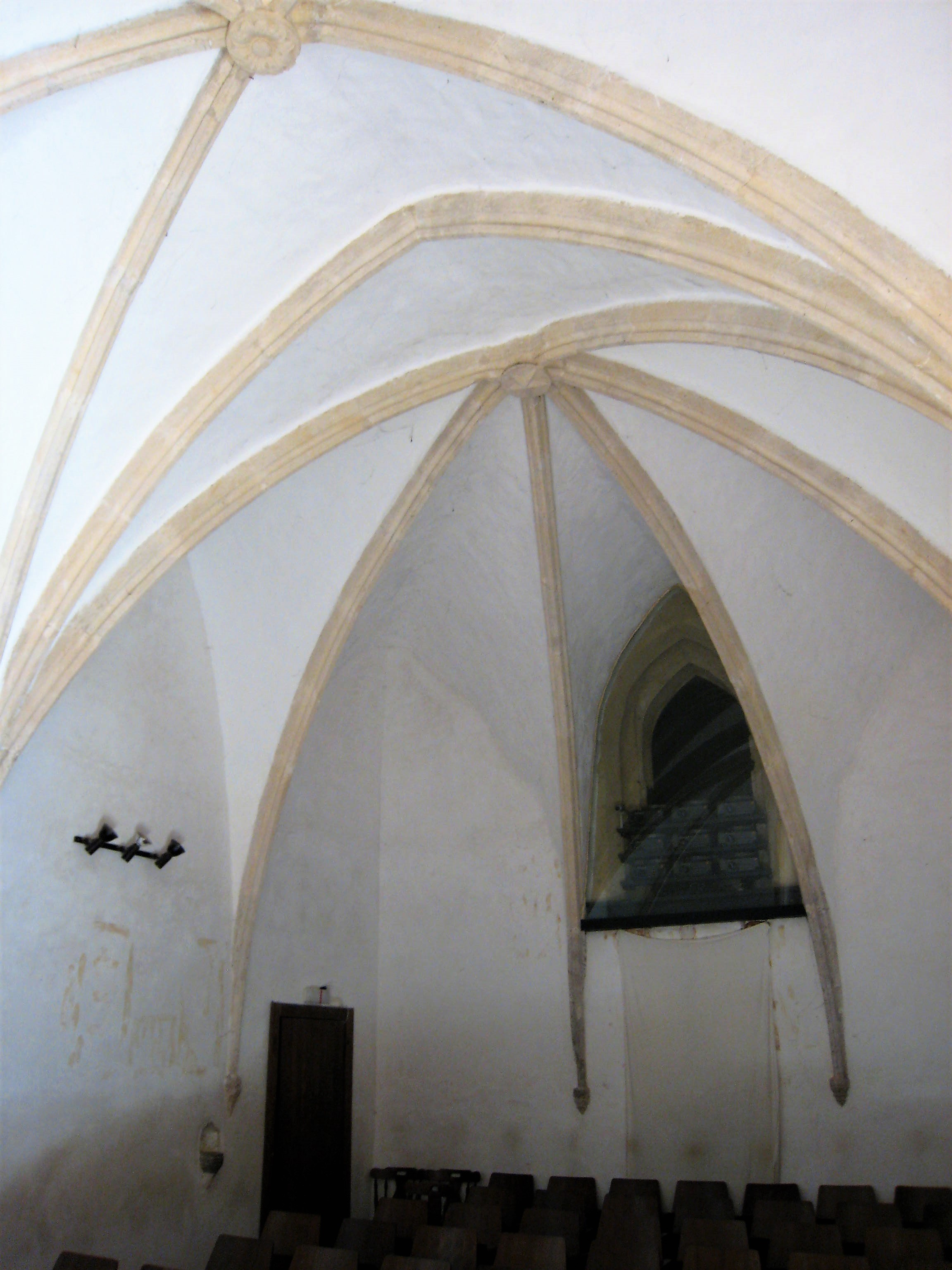 Cerkev sv. Trojice, Pleterje: zakristija